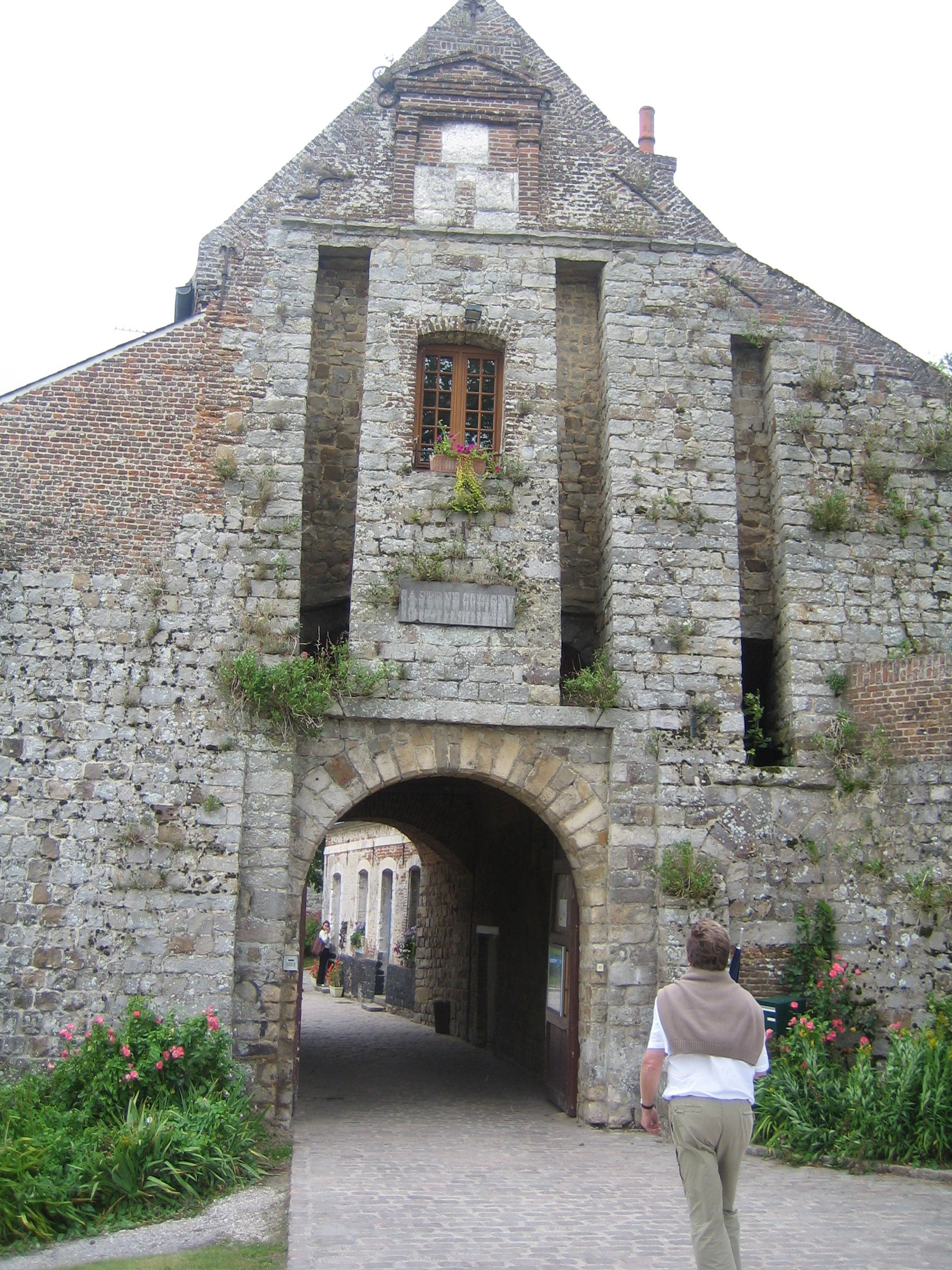 Entrré de la citadelle de Montreuil-sur-Mer